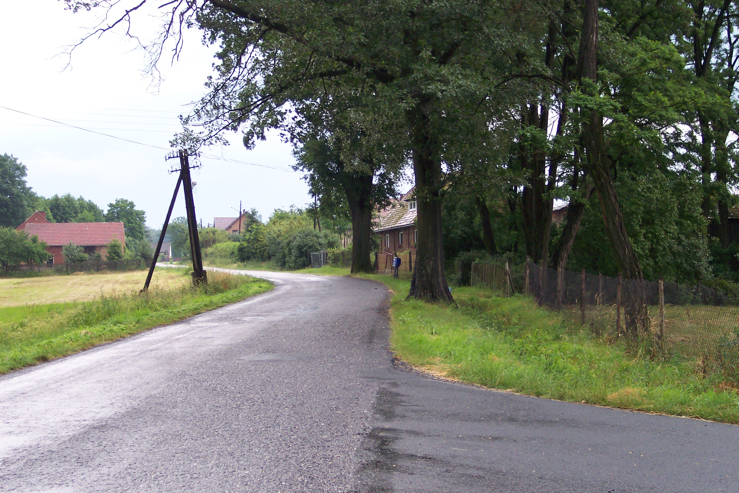 Osiecko (woj. opolskie)